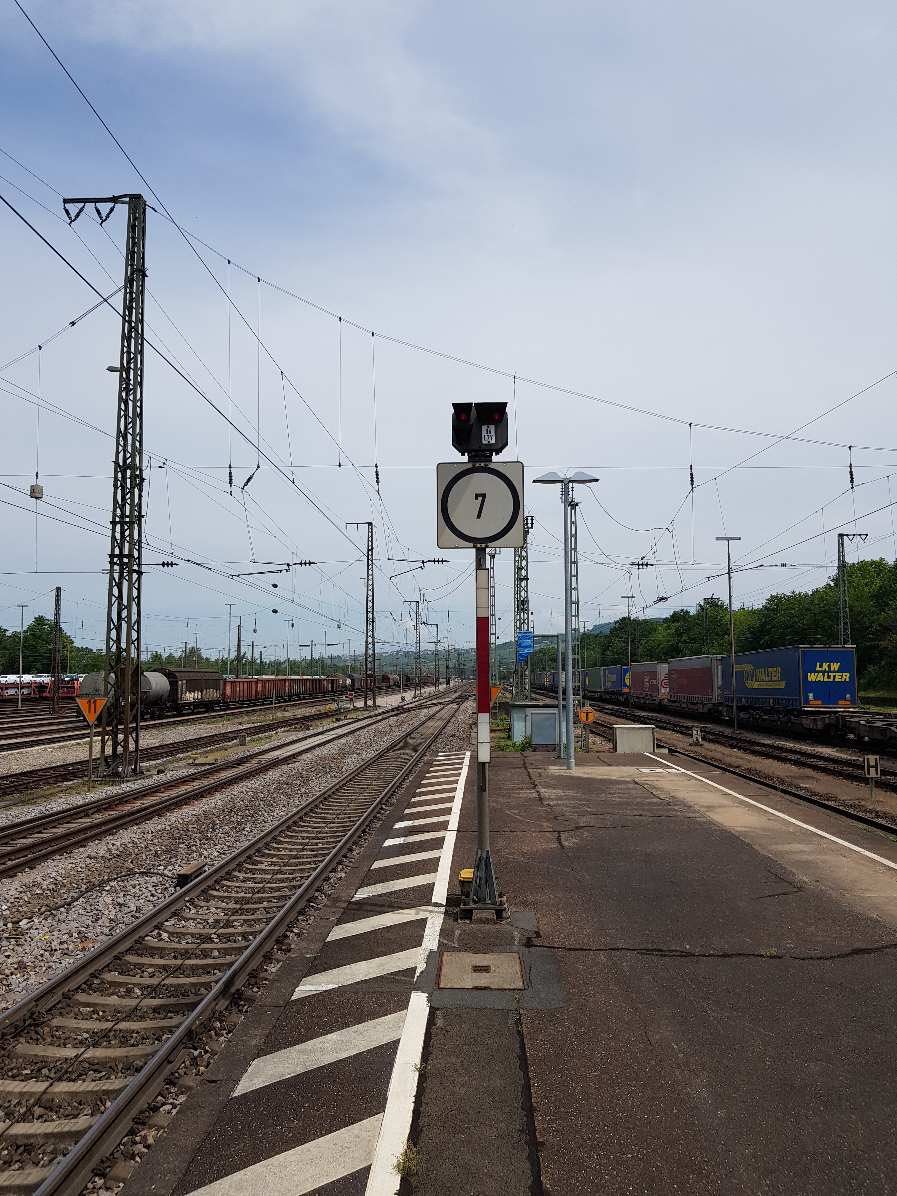 Licht-Sperrsignal mit (LZB-)Blockkennzeichen in Weil am Rhein